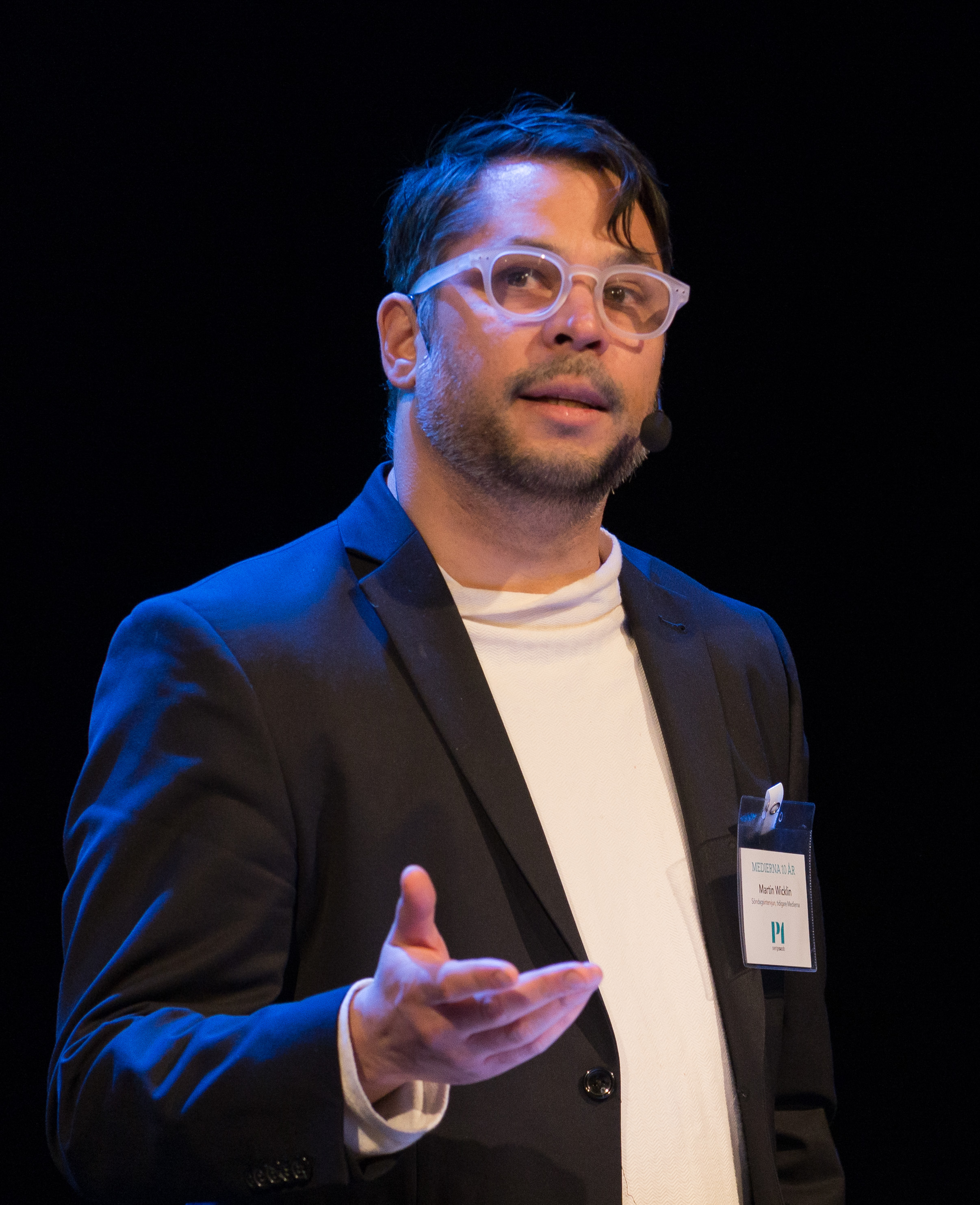 Martin Wicklin på Kulturhuset Stadsteatern (Forum/Debatt) i Stockholm den 24 januari 2017 i samband med att Medierna i P1 fyller 10 år.